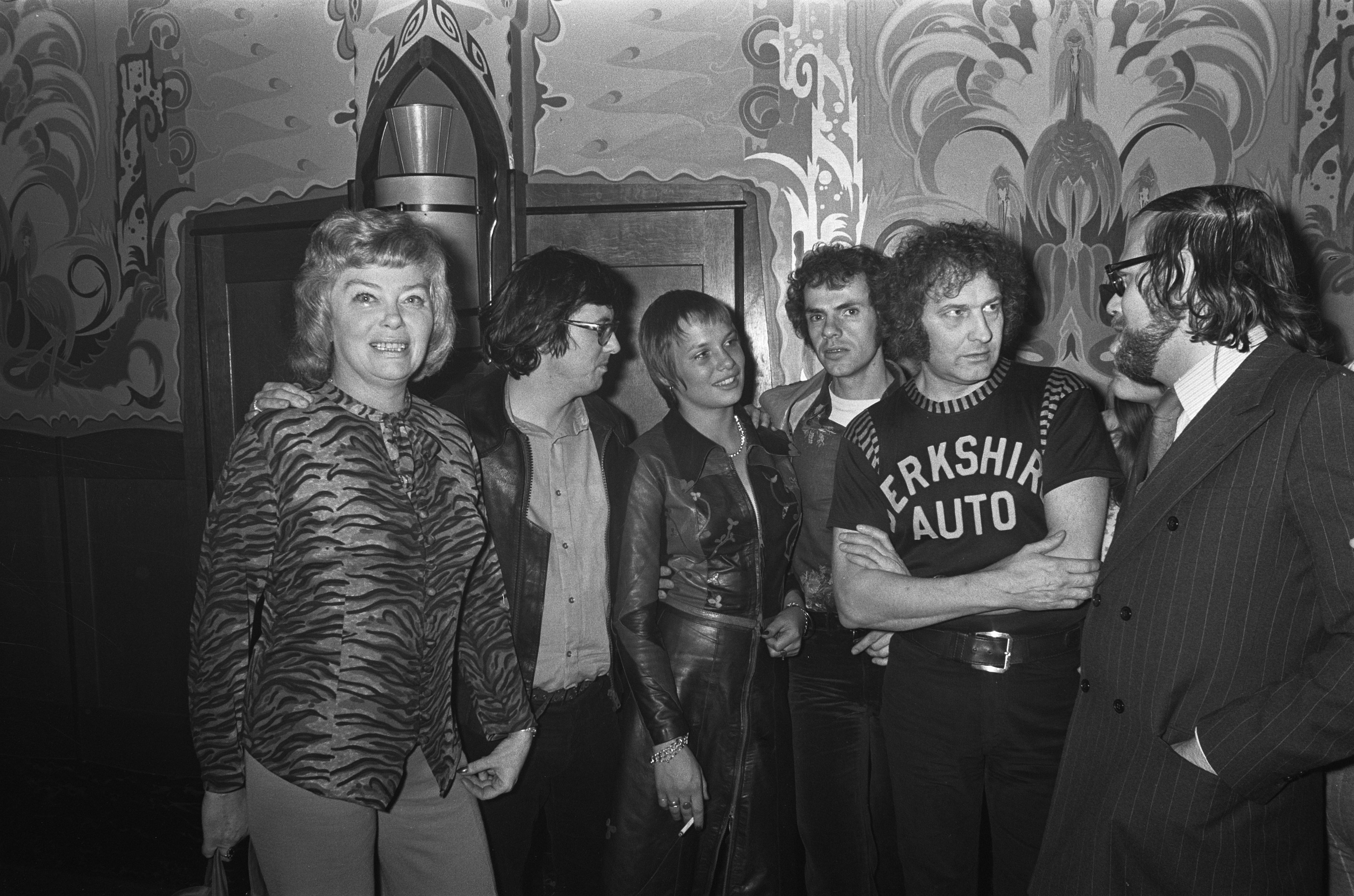 Collectie / Archief : Fotocollectie Anefo Reportage / Serie : [ onbekend ] Beschrijving : Première-voorstelling film "Turks Fruit" in Tuschinski, Vlnr. Tonny Huurdeman, Paul Verhoeven, Monique van de Ven, Jan de Bont, Jan Wolkers en Rob Houwer Datum : 22 februari 1973 Locatie : Amsterdam, Noord-Holland Trefwoorden : actrices, cameramannen, filmproducers, filmregisseurs, films, schrijvers Persoonsnaam : Bont, Jan de, Houwer, Rob, Huurdeman, Tonny, Ven, Monique van de, Verhoeven, Paul, Wolkers, Jan Fotograaf : Peters, Hans / Anefo Auteursrechthebbende : Nationaal Archief Materiaalsoort : Negatief (zwart/wit) Nummer archiefinventaris : bekijk toegang 2.24.01.05 Bestanddeelnummer : 926-2388